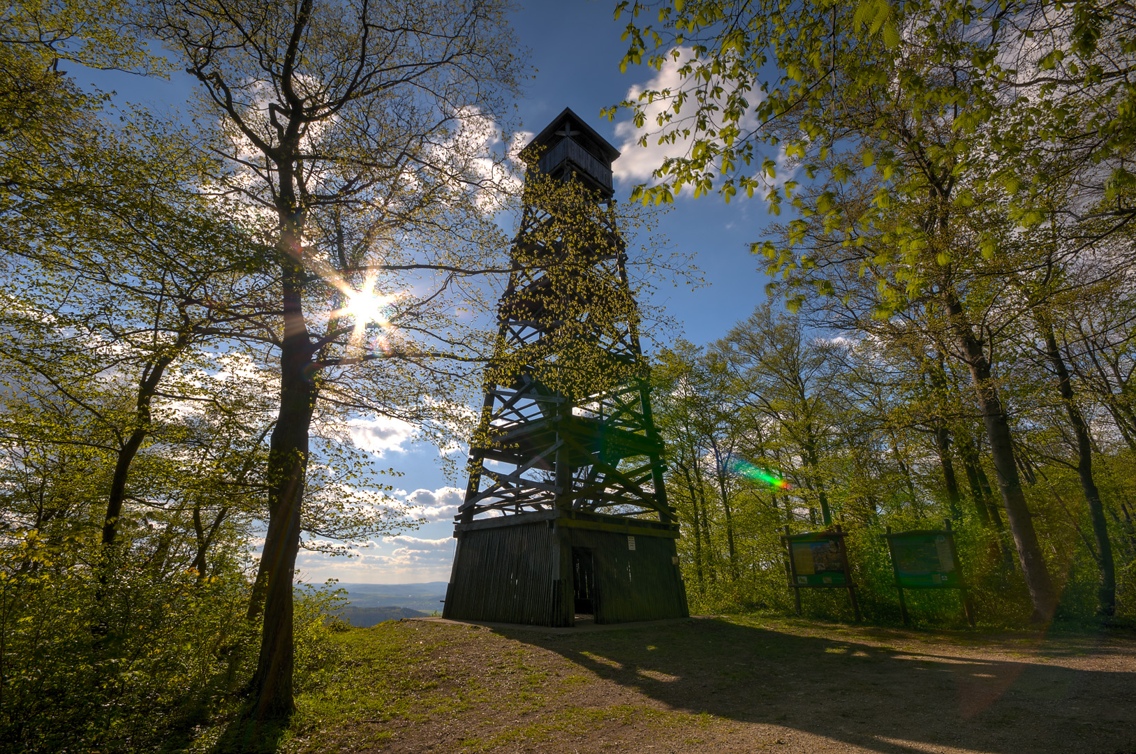 Wanfried auf der Plesse, "Der Plesseturm" Blick von Ost